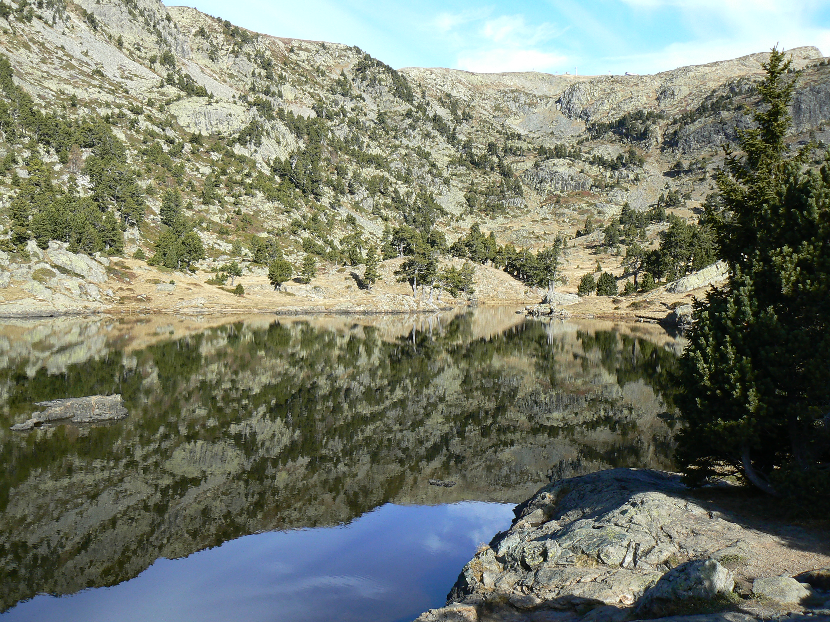 lac Achard